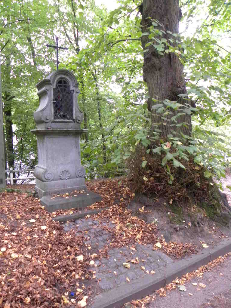 Chapelle Saint Sauveur Noirhat Bousval, le long de la drève du château de la Motte à Noirhat.